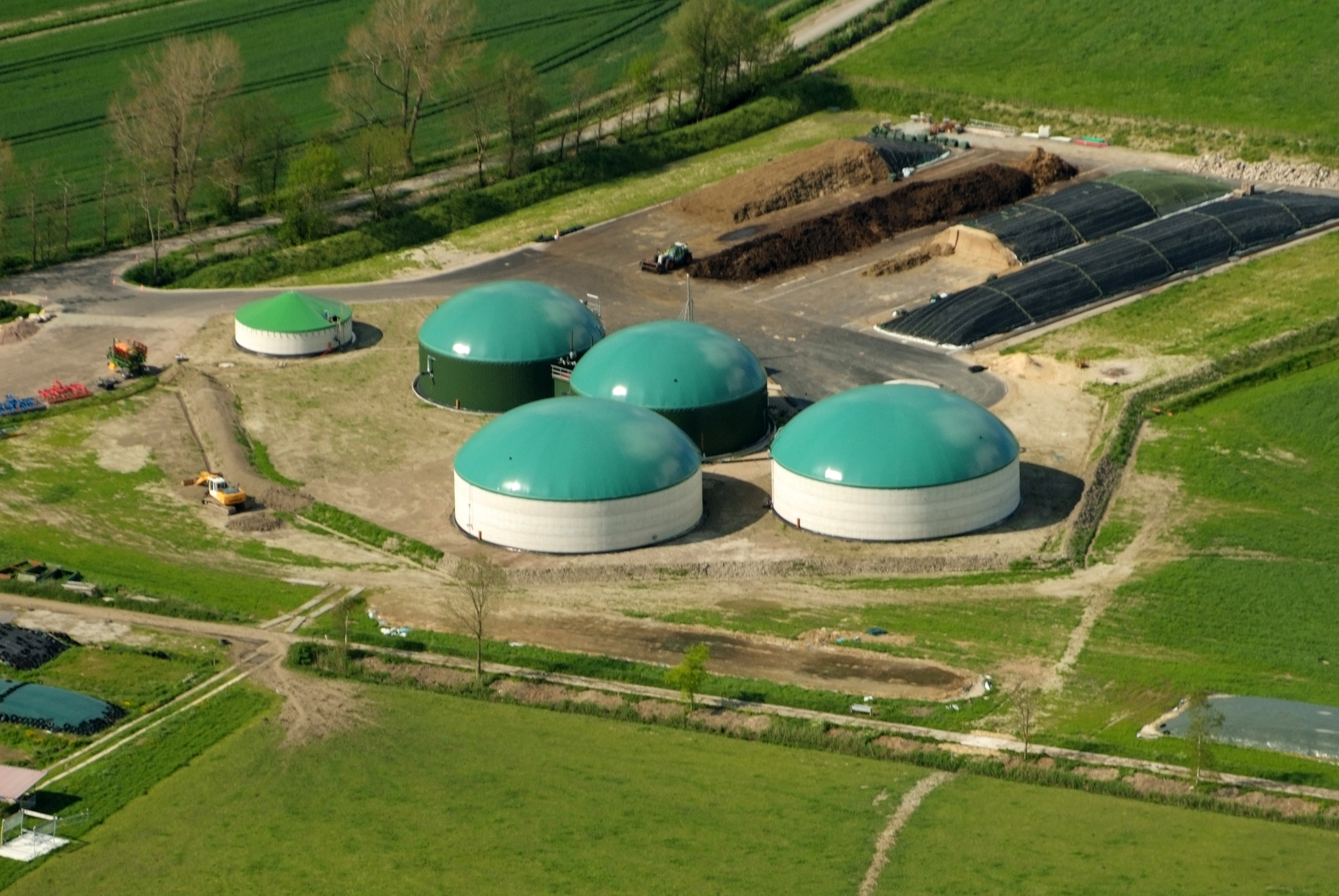 Fotoflug vom Flugplatz Nordholz-Spieka über Bremerhaven, Wilhelmshaven und die Ostfriesischen Inseln bis Borkum